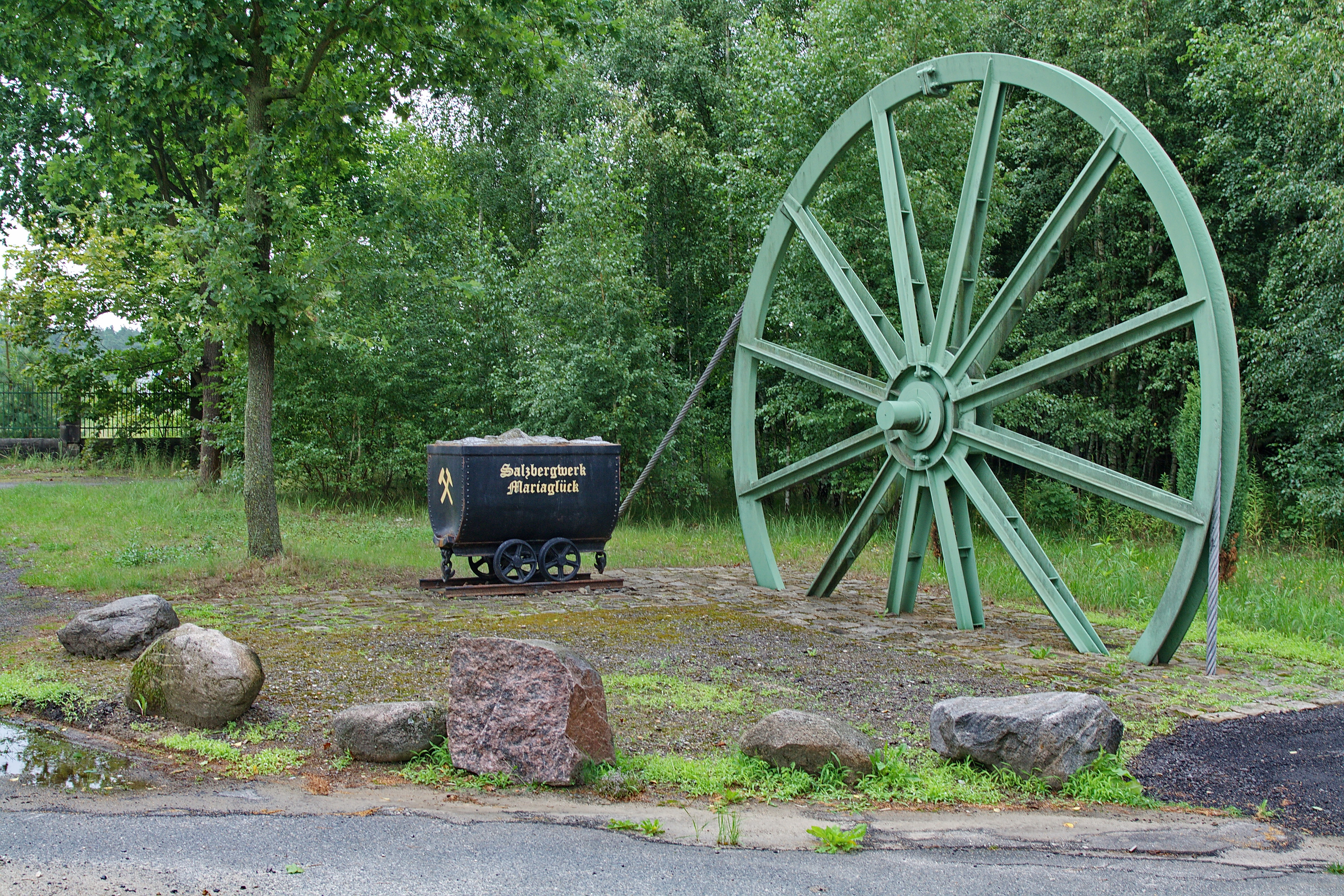 Vor der Grube "Mariaglück" in Höfer (Samtgemeinde Eschede), Niedersachsen, Deutschland